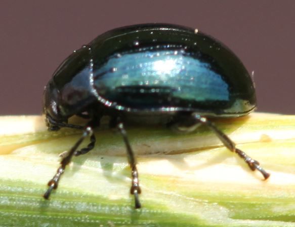 Phaedon armoraciae am 8.7.2017 in der Schwetzinger Hardt